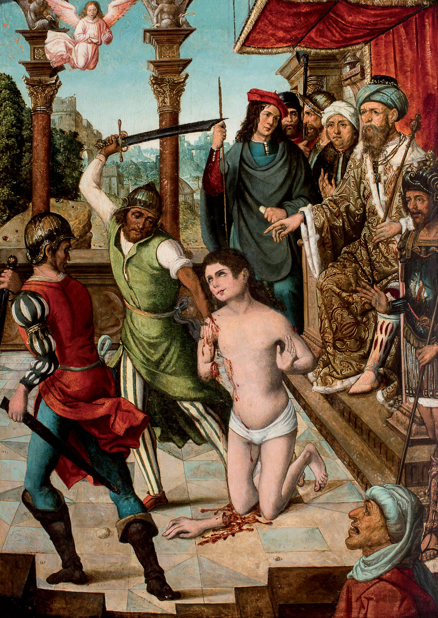 Martirio de san Pelayo, óleo sobre tabla, 57 x 41,5 cm, subastas Durán, mayo de 2014